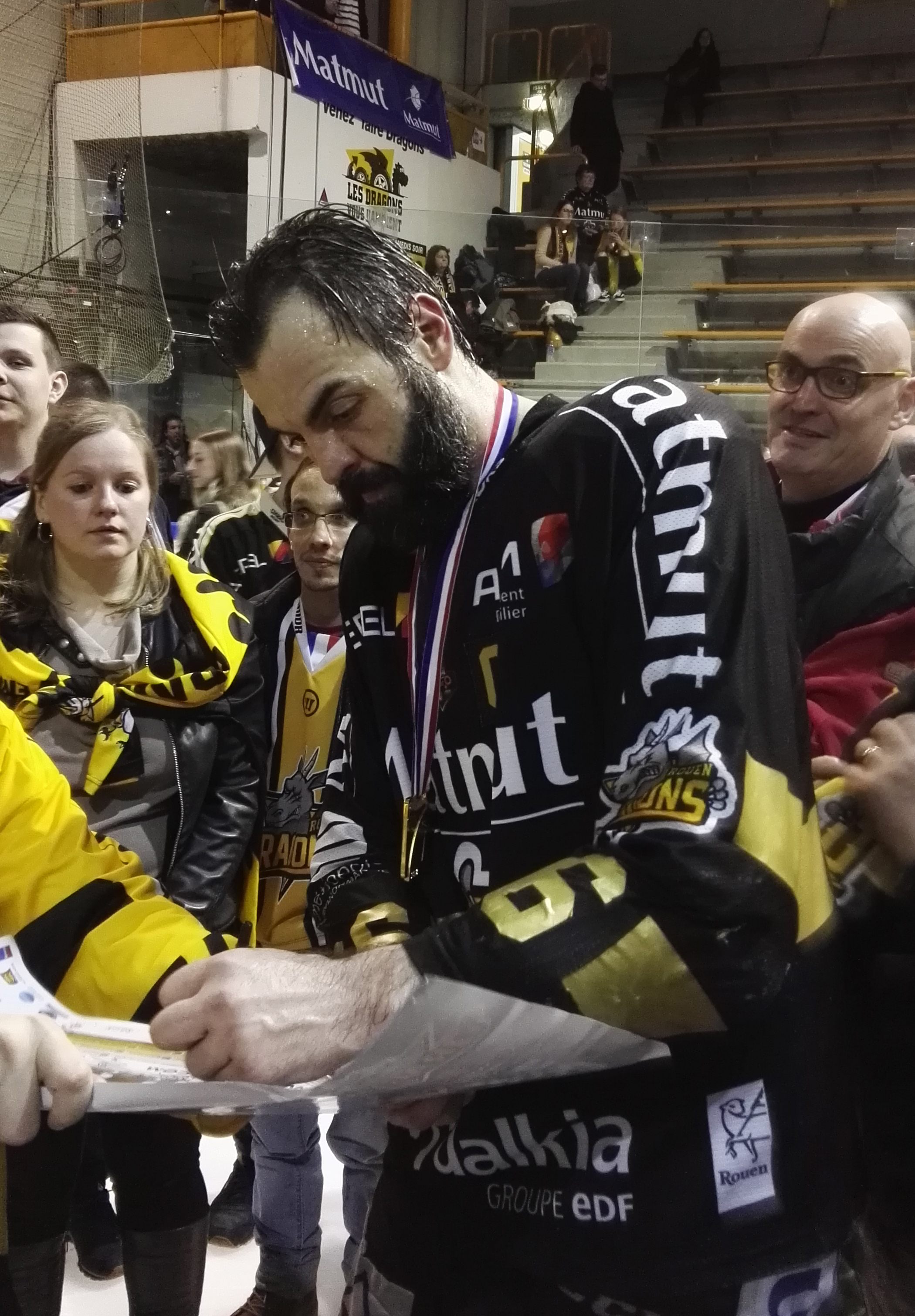 Le capitaine des Dragons de Rouen, Mathieu Roy signe des autographes suite à la victoire du championnat de France 2017-2018